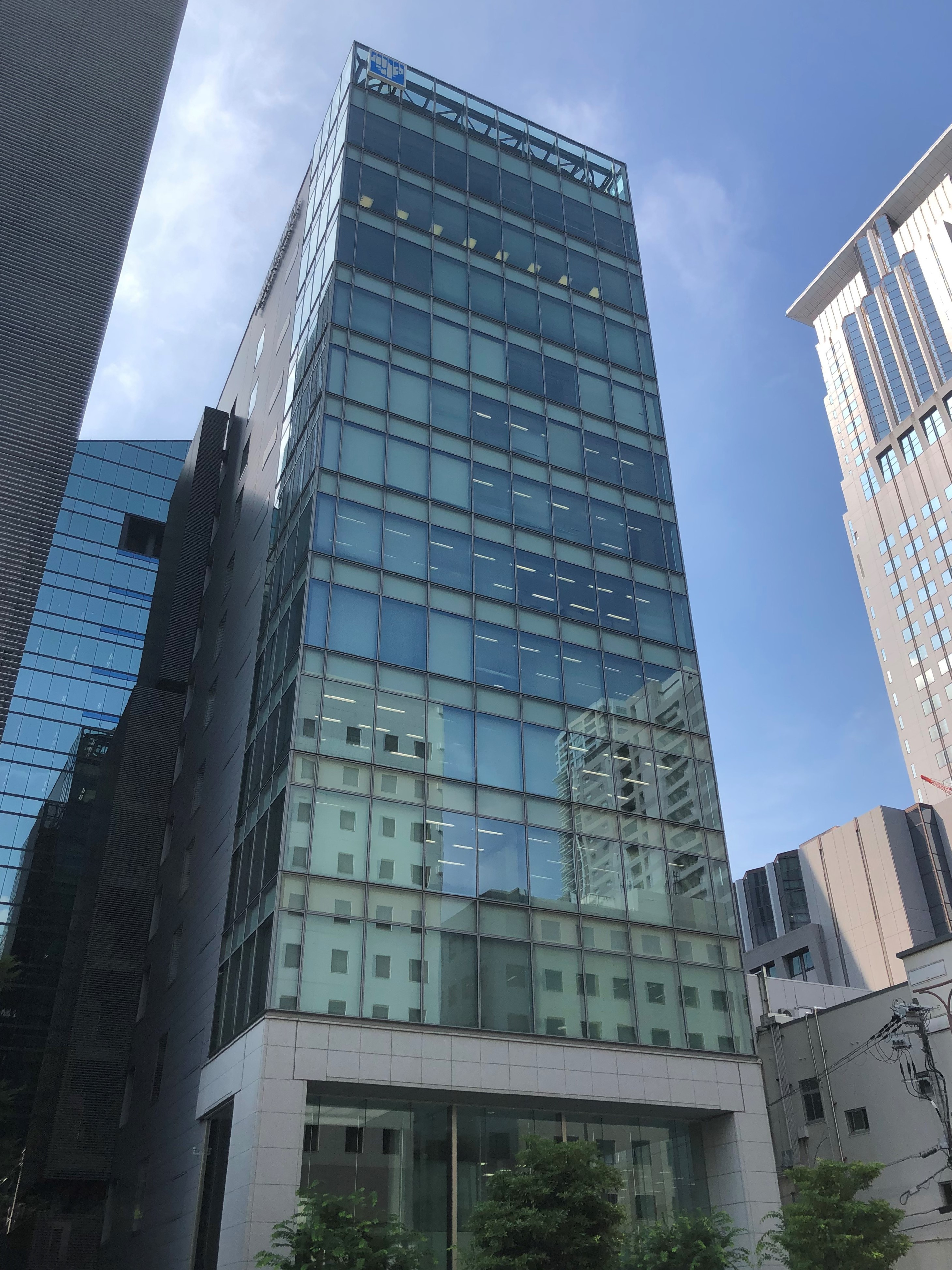 池田泉州銀行本店